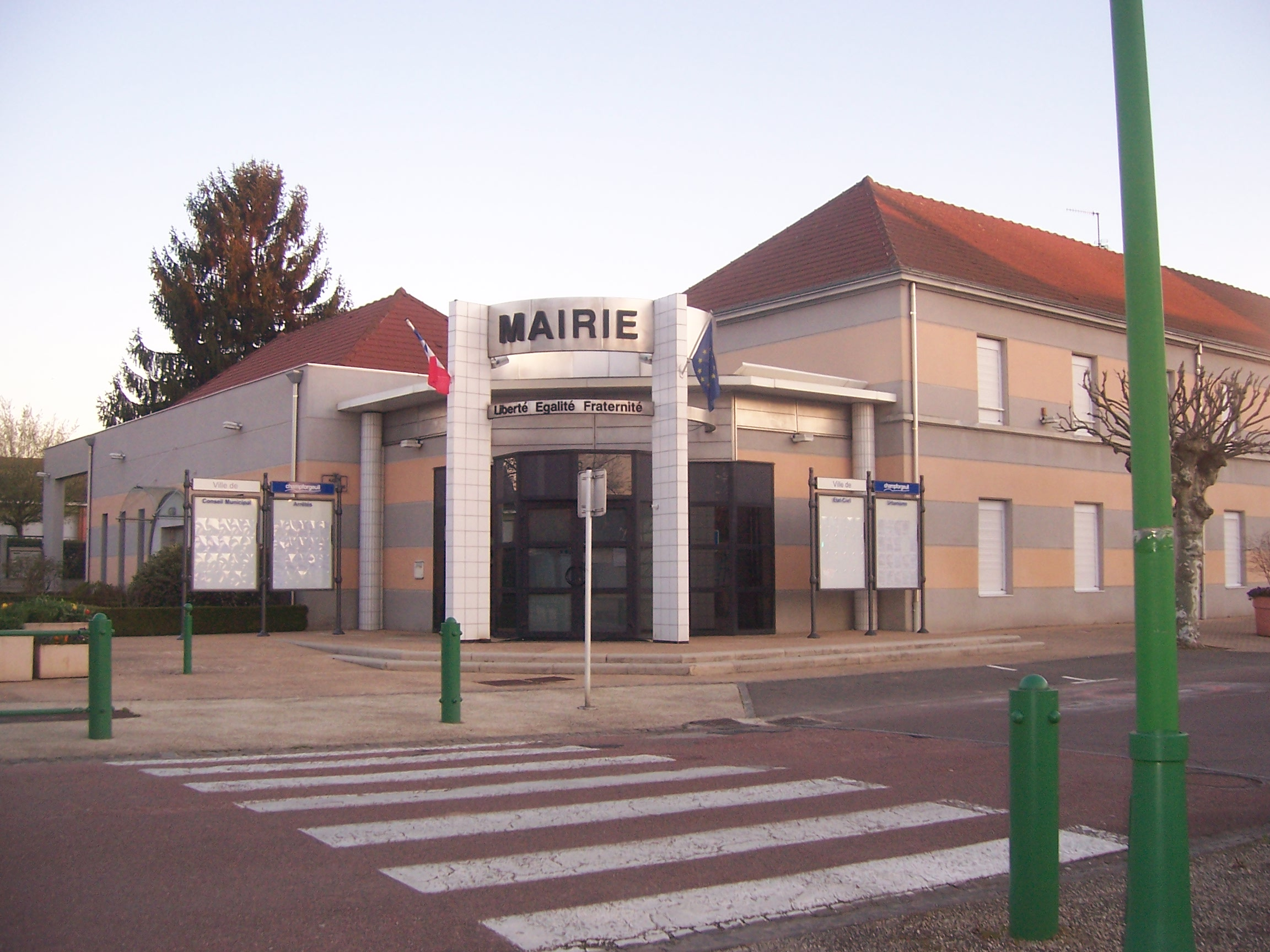 Mairie de Champforgeuil